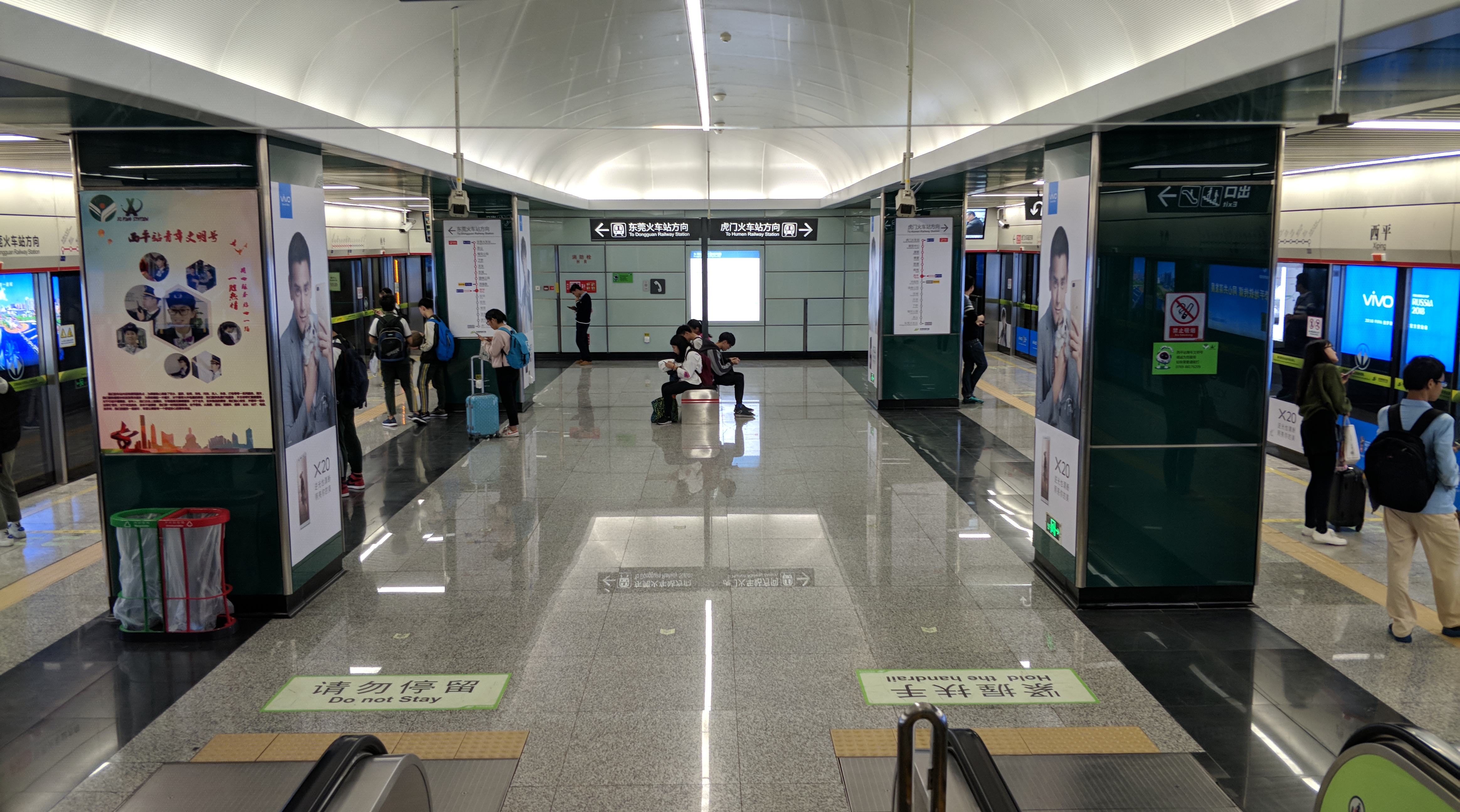 东莞轨道交通西平站站台